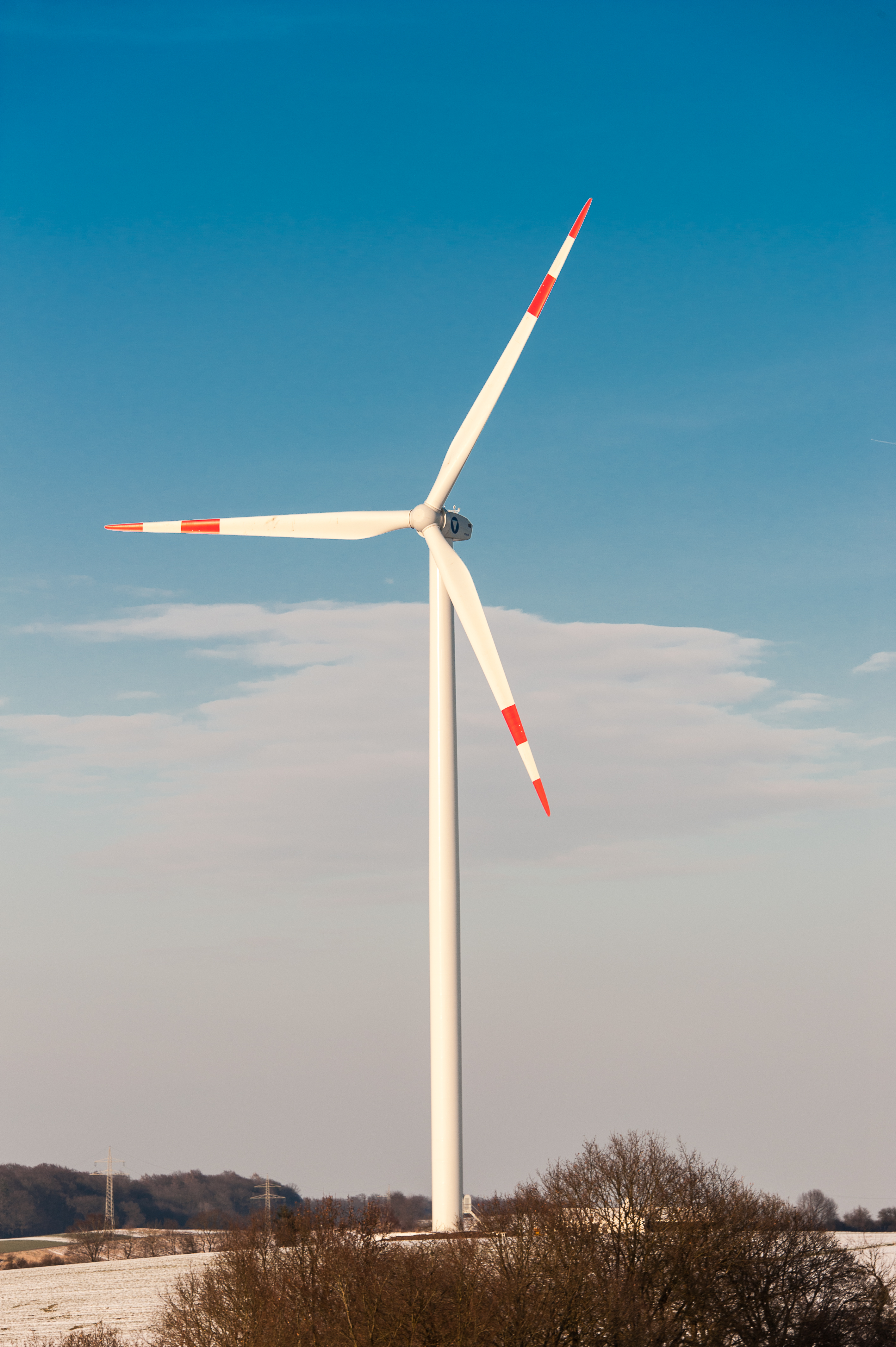 Windkraftanlage von Vensys in Tholey